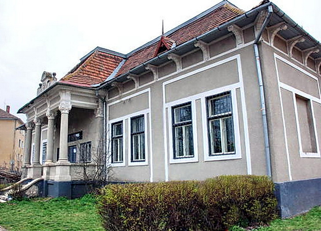 Câmpia Turzii, Str.1 Decembrie 1918 nr.17, clădire ce aparţine Liceului teoretic "Pavel Dan" (fostul conac Szentkereszty-Bethlen)